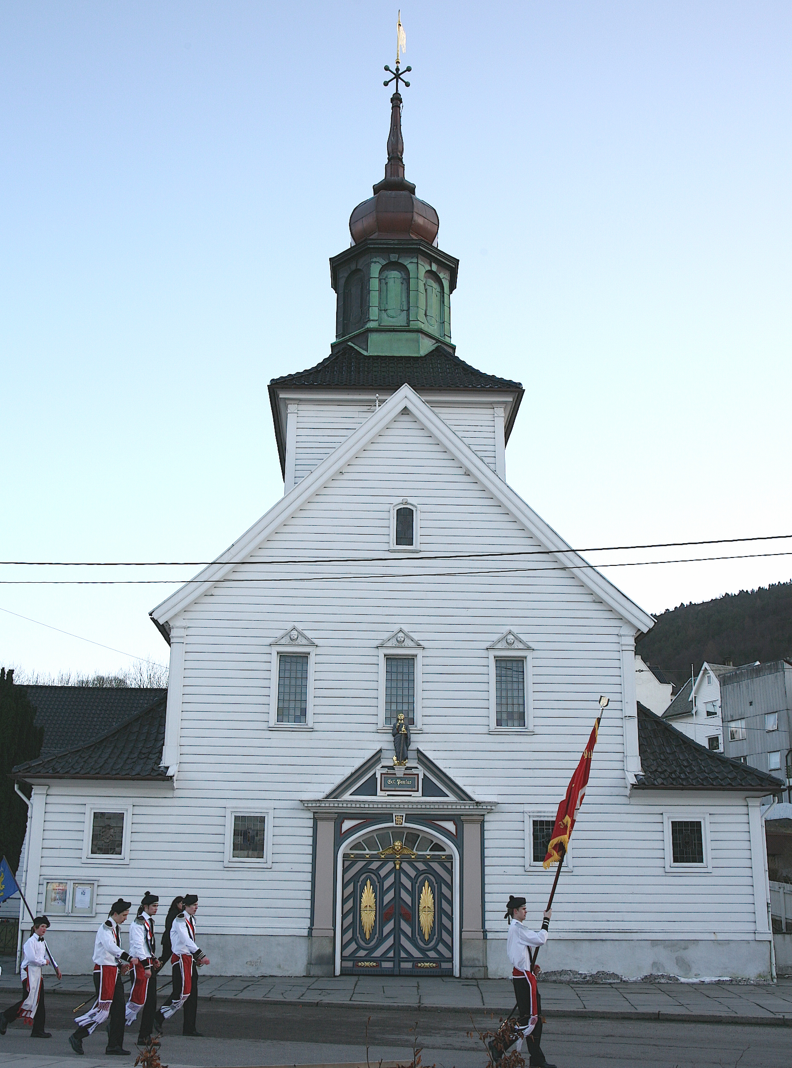 Laksevåg Kirke